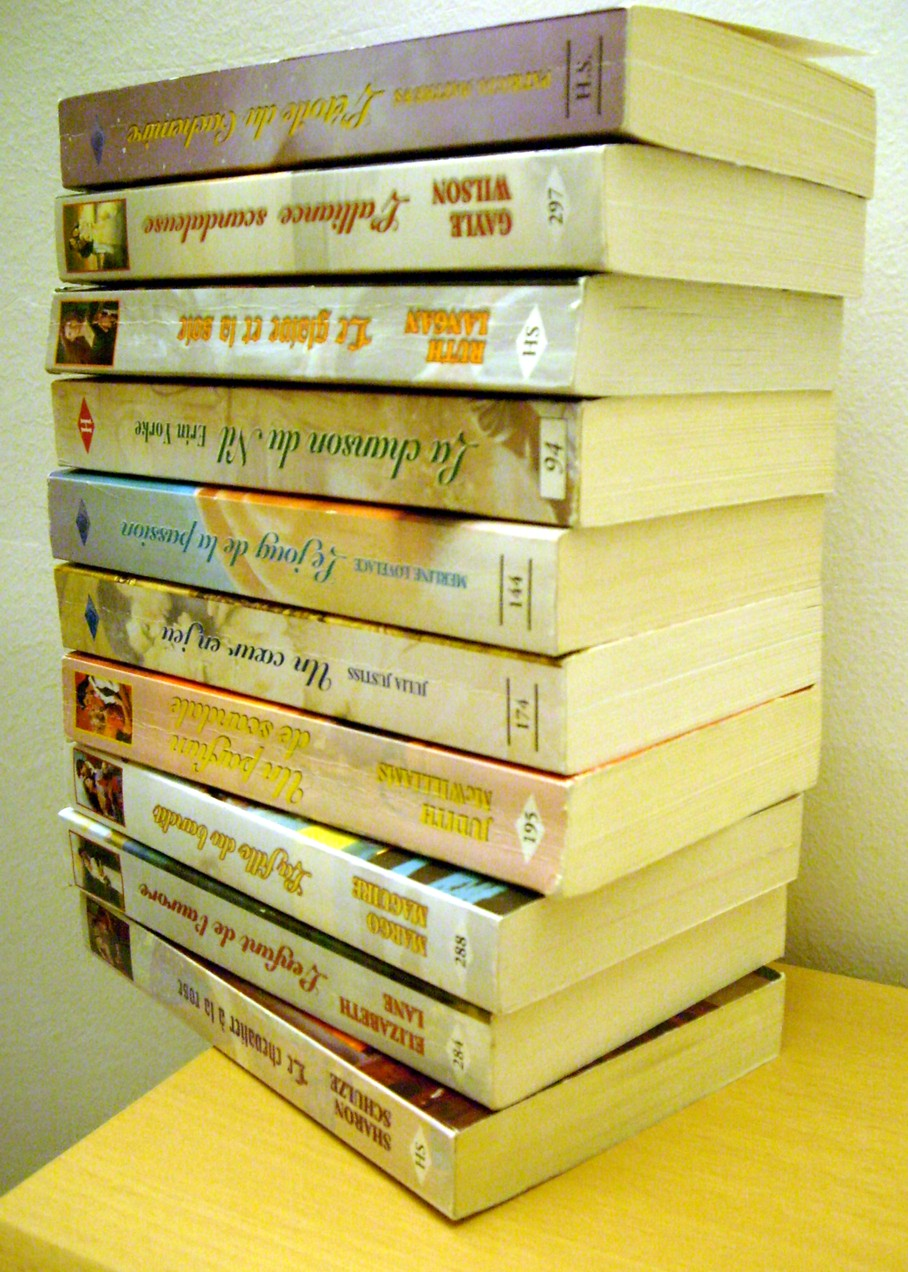 Lot de romans de la collection Les Historiques des éditions Harlequin